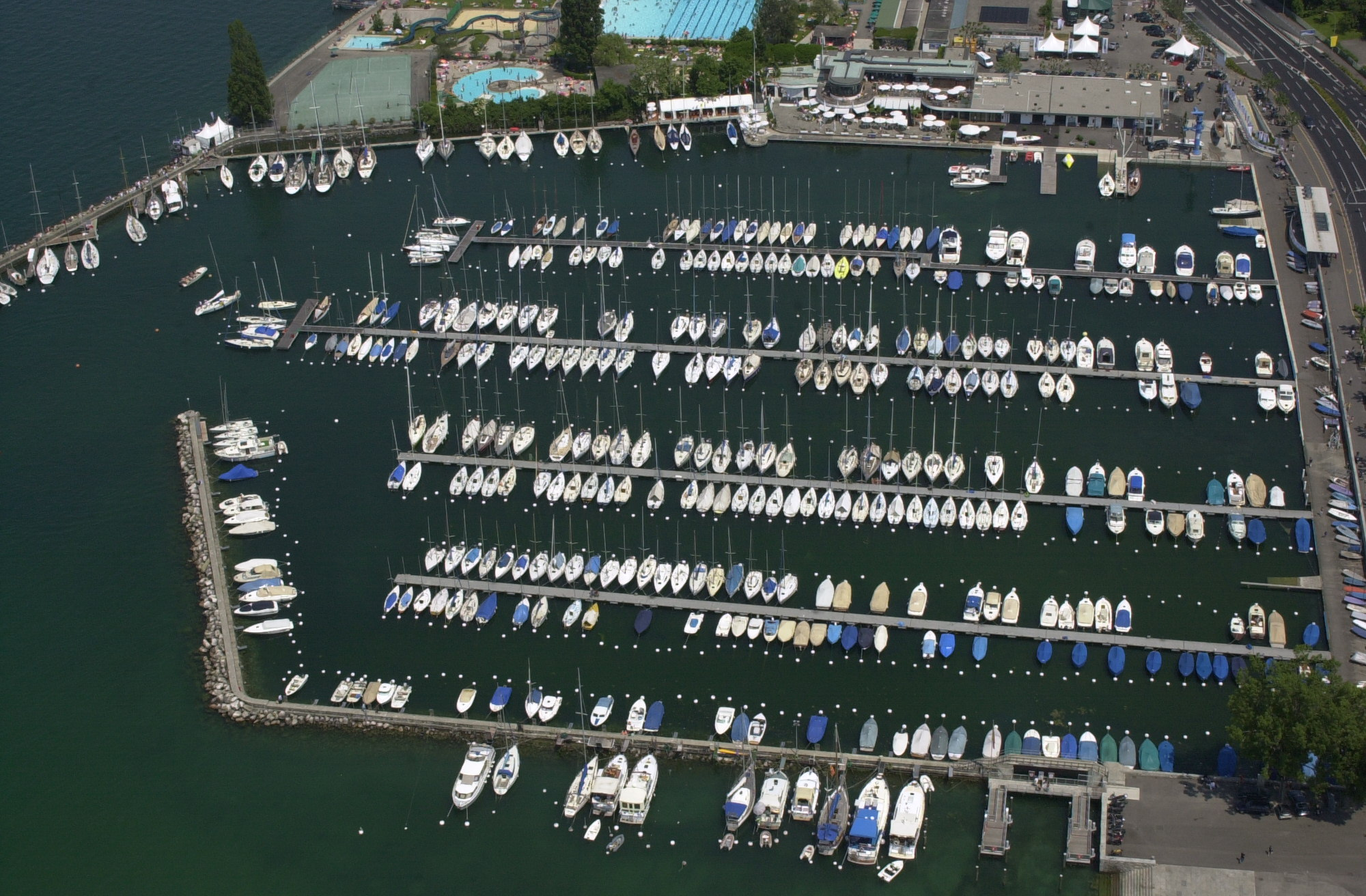 Vue aérienne de la Société Nautique de Genève